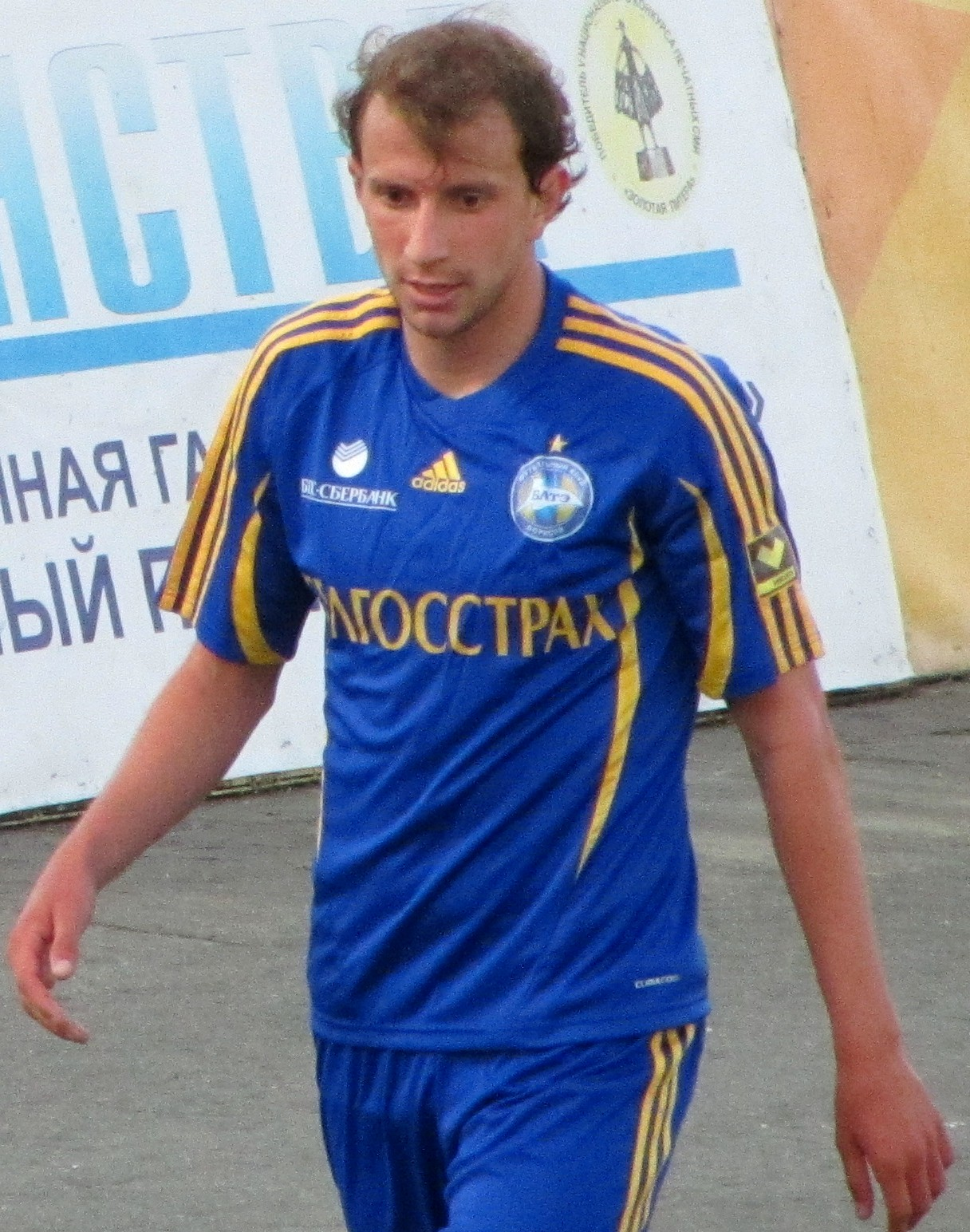 Бразилец Ренан Брессан, игрок ФК БАТЭ (Борисов, Беларусь) в 2010-2012 гг